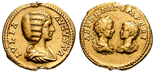 Zeldzame gouden munt (een aureus, 7.47g, geslagen in Rome, 201) met de portretten van de Romeinse keizerin Julia Domna en haar twee zoons de medekeizer Caracalla (gelauerd portret) en kroonprins Geta.